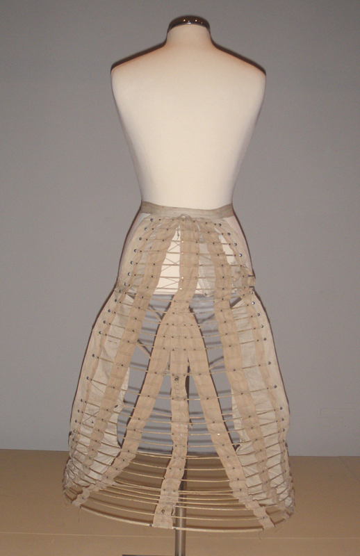 Κρινολίνο 1873 2009.6.1186 / Συλλογή Πελοποννησιακού Λαογραφικού Ιδρύματος